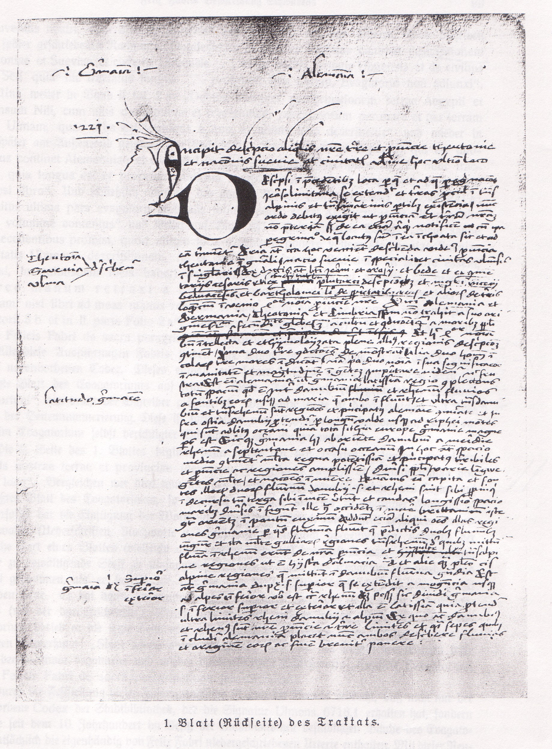 Blatt 1 Rückseite des Autographs von Felix Fabri: Beschreibung Schwabens und Abhandlung von der Stadt Ulm, Stadtarchiv Ulm